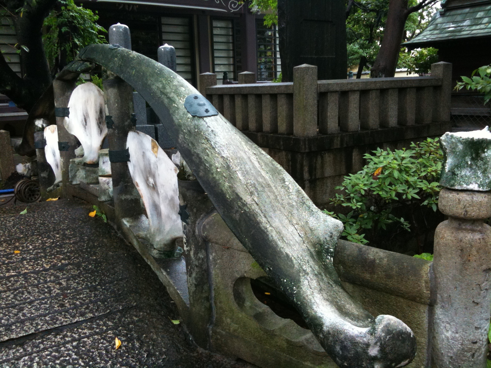 鯨橋の近影写真